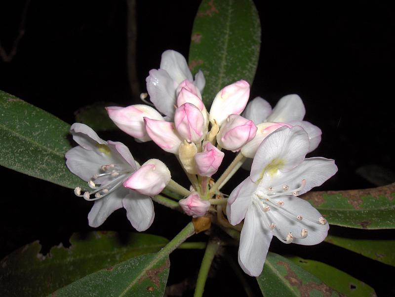 Rosebay Rhododendron